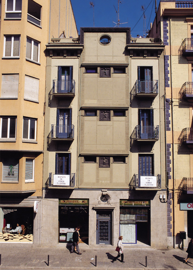 Reforma integral i ampliació d'edifici